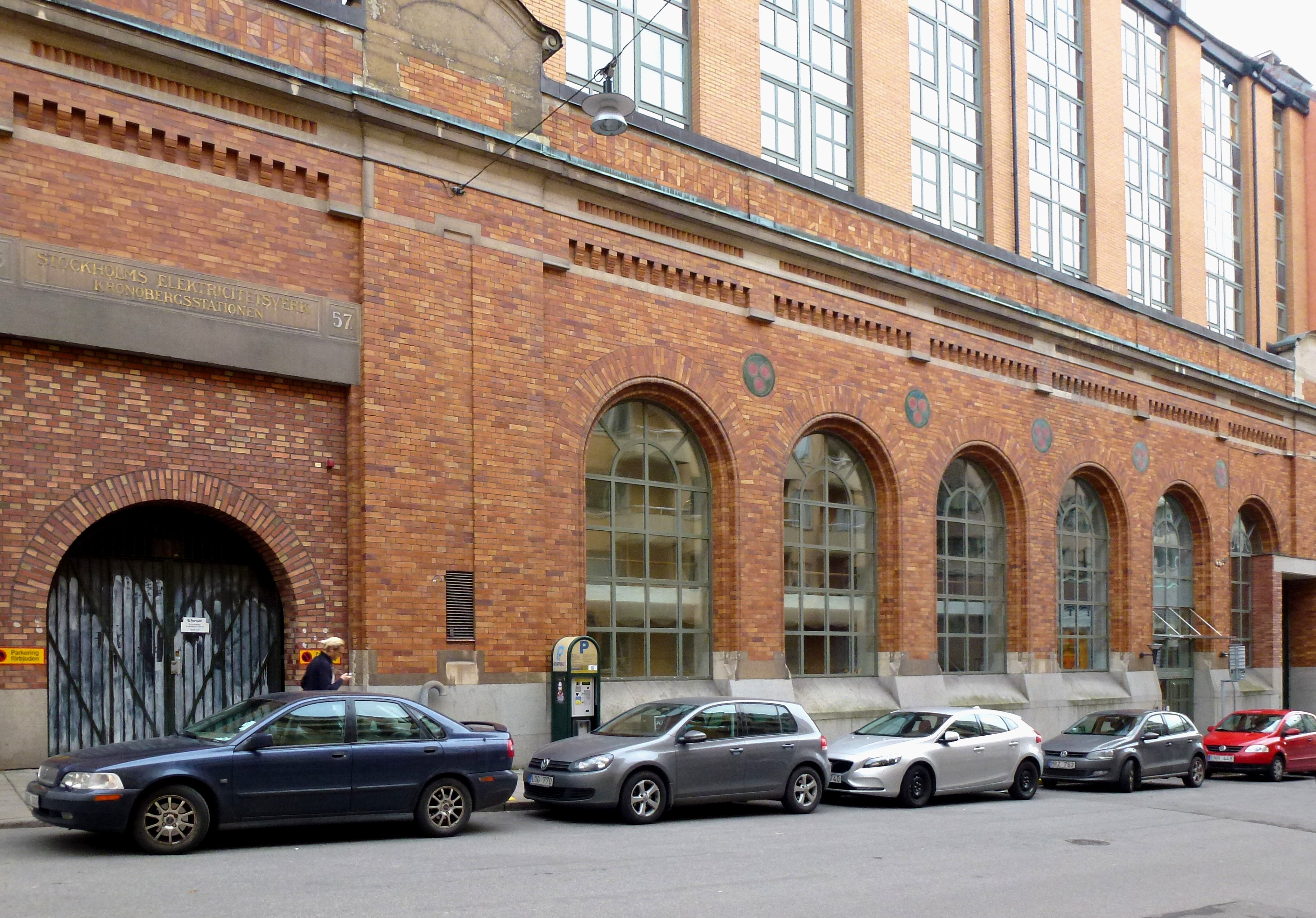 Kronobergsstationen, fasad mot Sankt Göransgatan